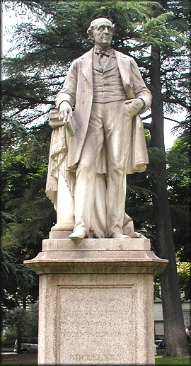 Monument to Laurent Cerise (1807-1869)